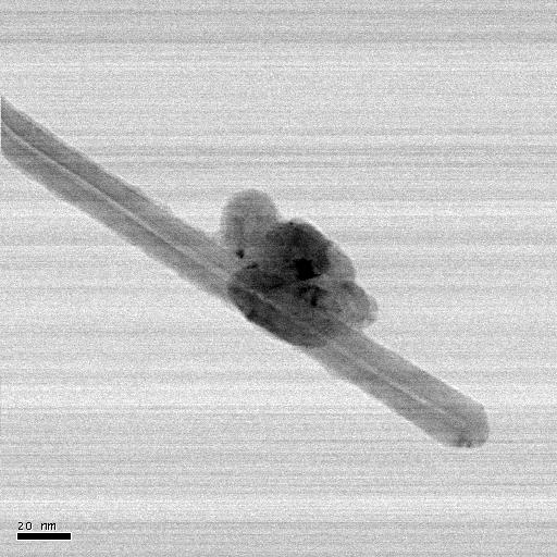 Image réalisée par microscopie électronique en transmission à balayage (STEM) d'un nanotube de carbone multiparoi.